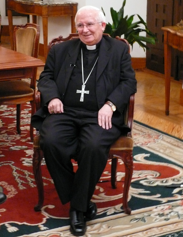 Cardenal Antonio Cañizares, Arzobispo de Toledo